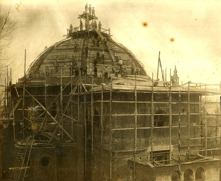 Bauarbeiten St. Augustinus, Nordhorn. 1912. Das Foto wurde bereits von jemand anderem hochgeladen, enthielt aber einen Kopierfehler. Da ich es nicht korrigieren konnte, habe ich es als Ausschnittfoto erneut hochgeladen.